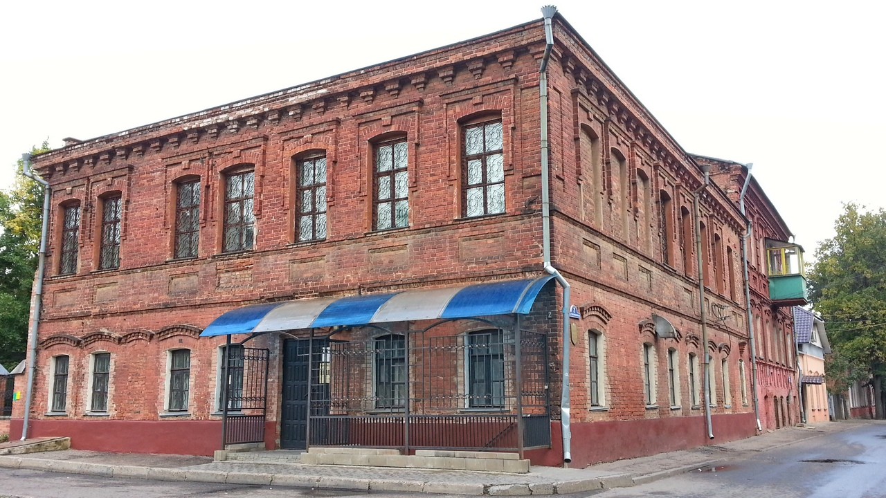 Беларуская (тарашкевіца): Забудова вул. Рэвалюцыйнай. г. Віцебск This is a photo of Belarusian heritage monument. Reference number: 213Г000068 ( WLM)